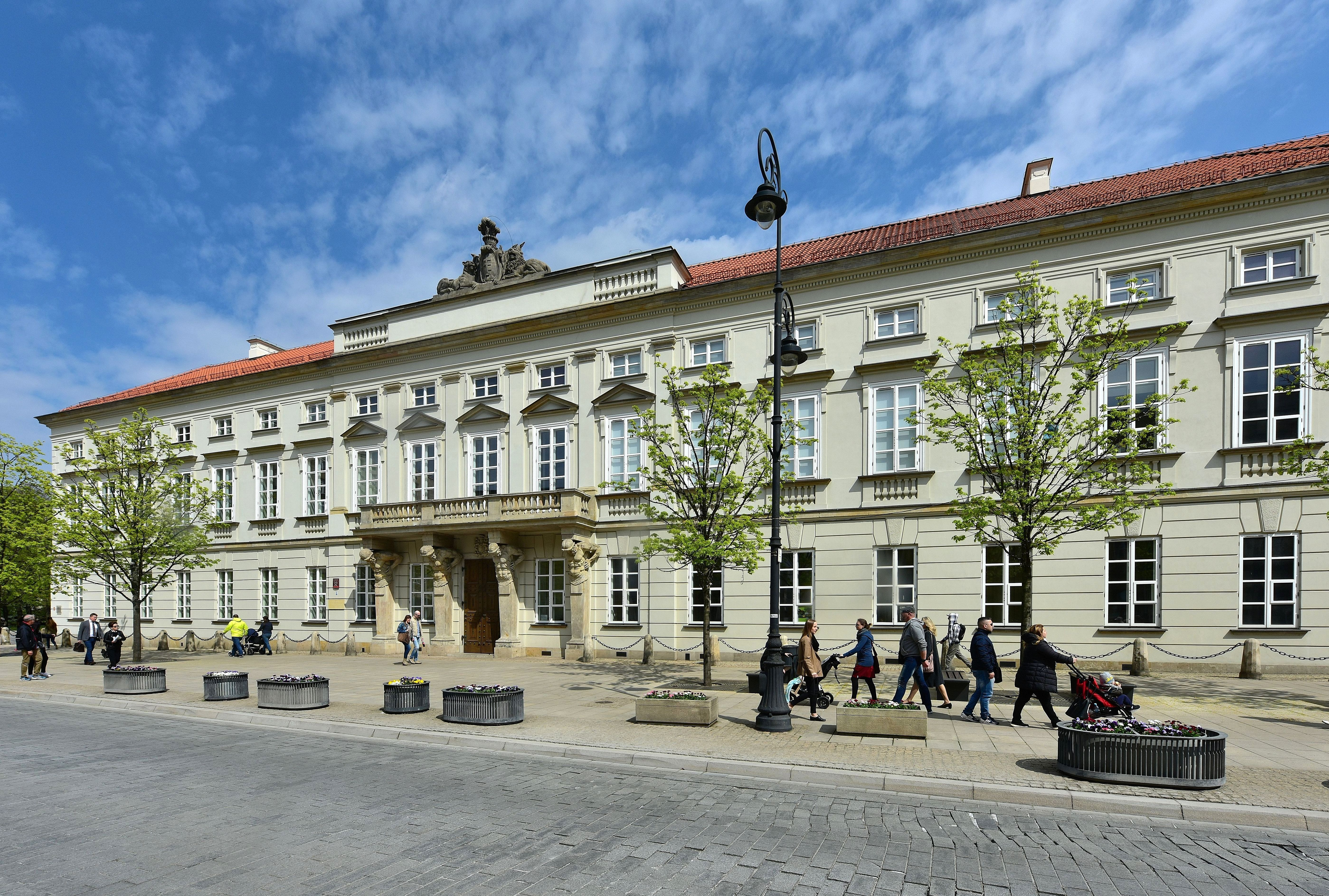 Pałac Tyszkiewiczów (Potockich) w Warszawie